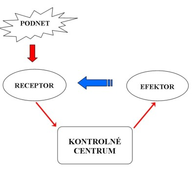 schéma spätnoväzbovej regulácie Licensing Kategória:Obrázky schém